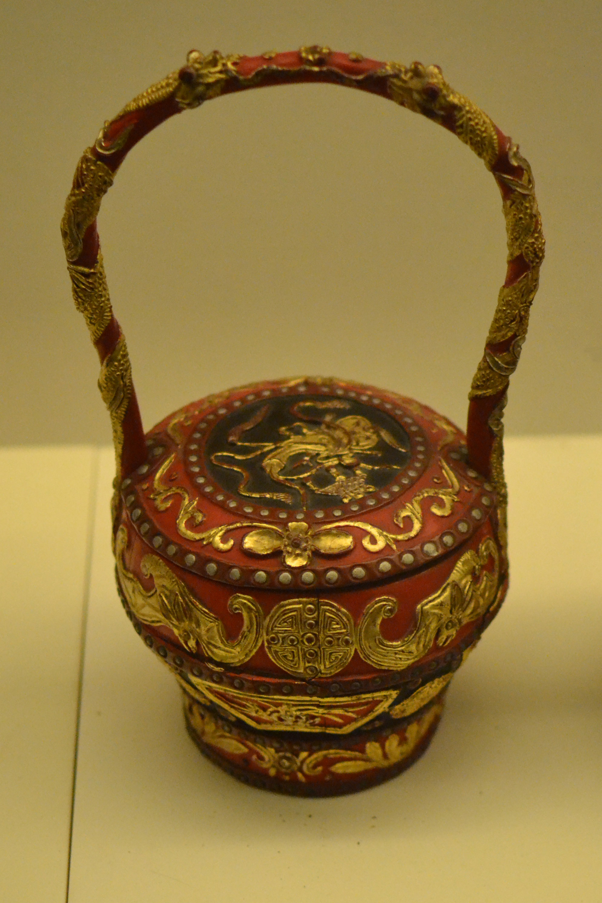 宁波博物馆藏清代提篮